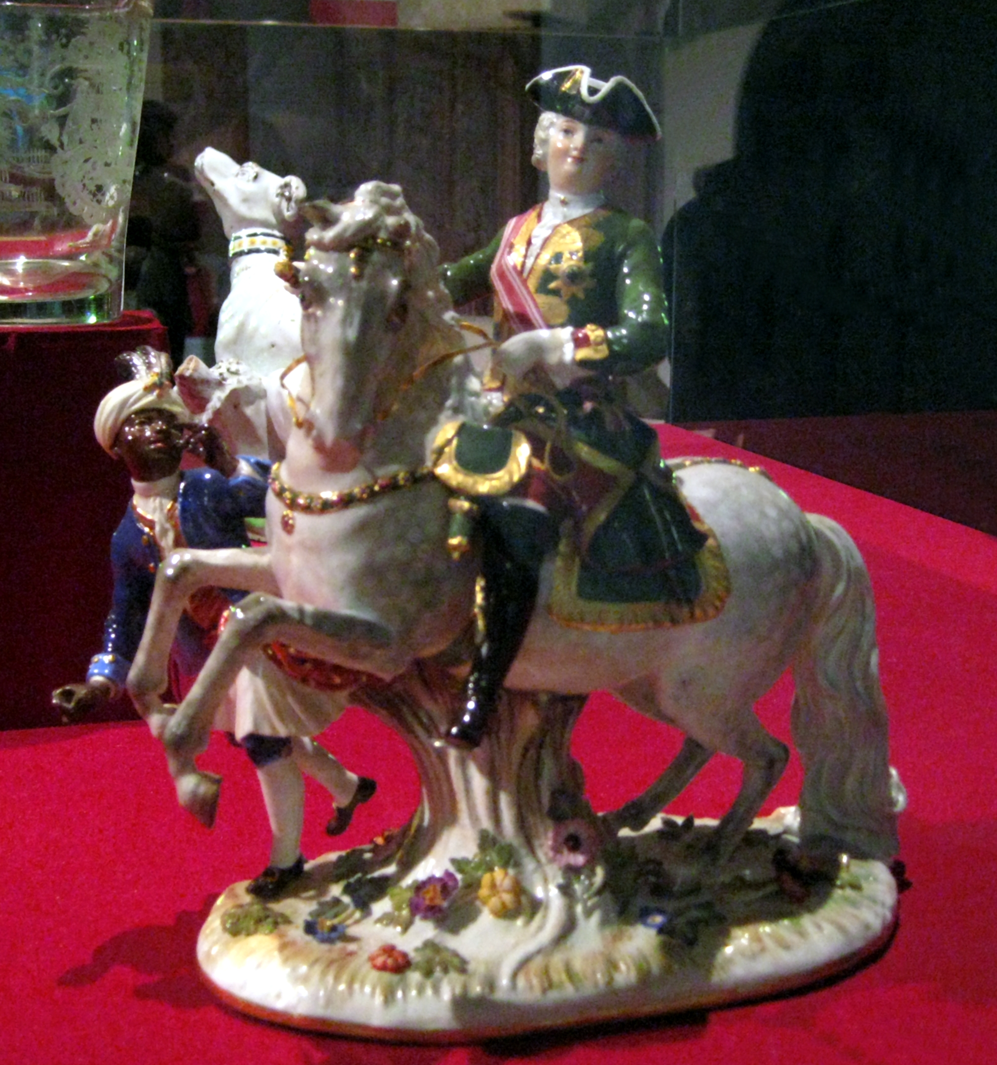 Императрица Елизавета Петровна с арапчонком. Скульптурная группа, фарфоровая статуэтка. Модель И.И. Кендлера (ок. 1748), по картине Г.Х. Гроота. Мейсенская мануфактура, Германия. Фарфор, металл, роспись надглазурная, позолота, цировка. ГТГ.